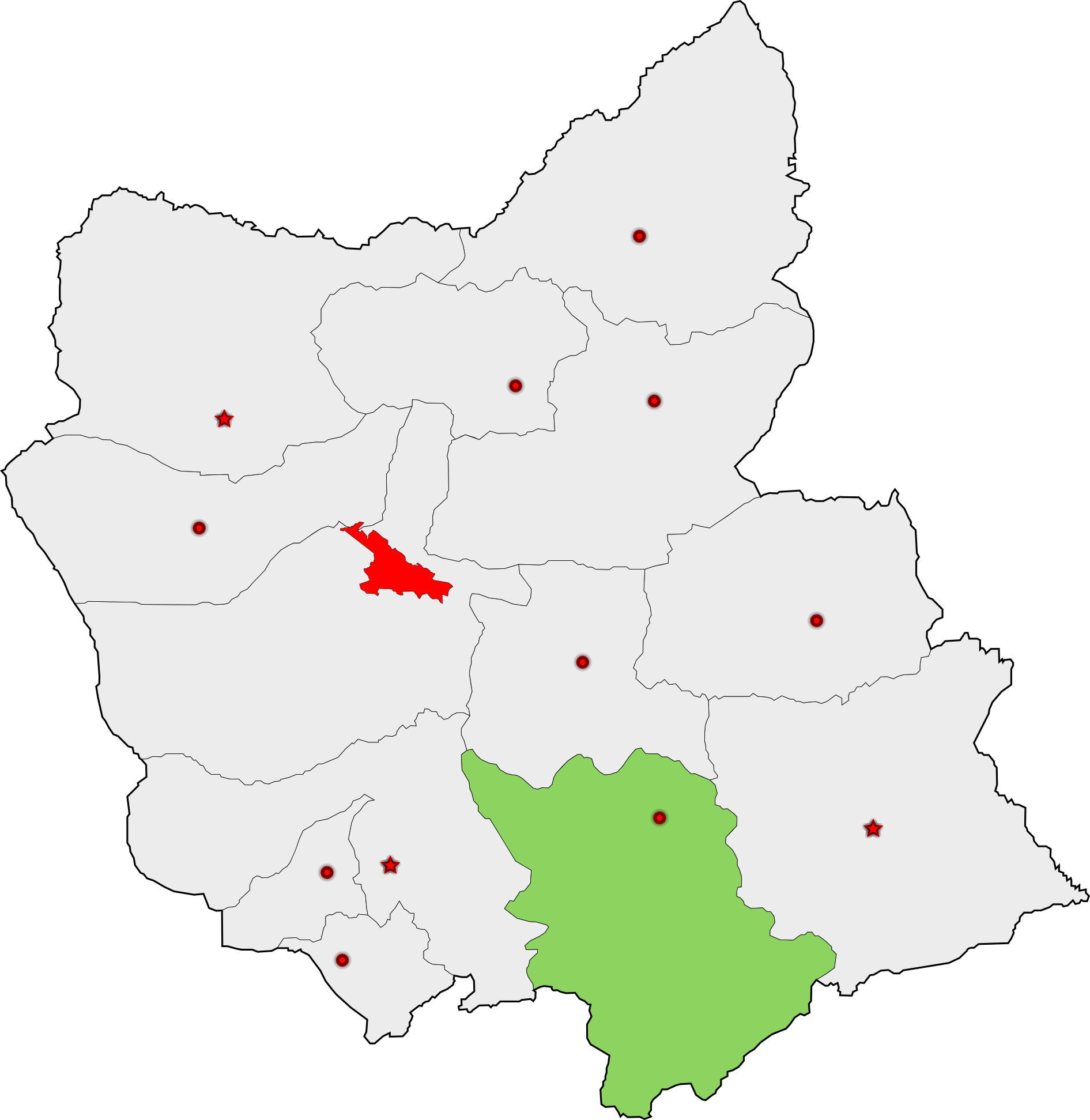 حوزهٔ انتخاباتی هشترود و چاراویماق برای انتخابات مجلس شورای اسلامی